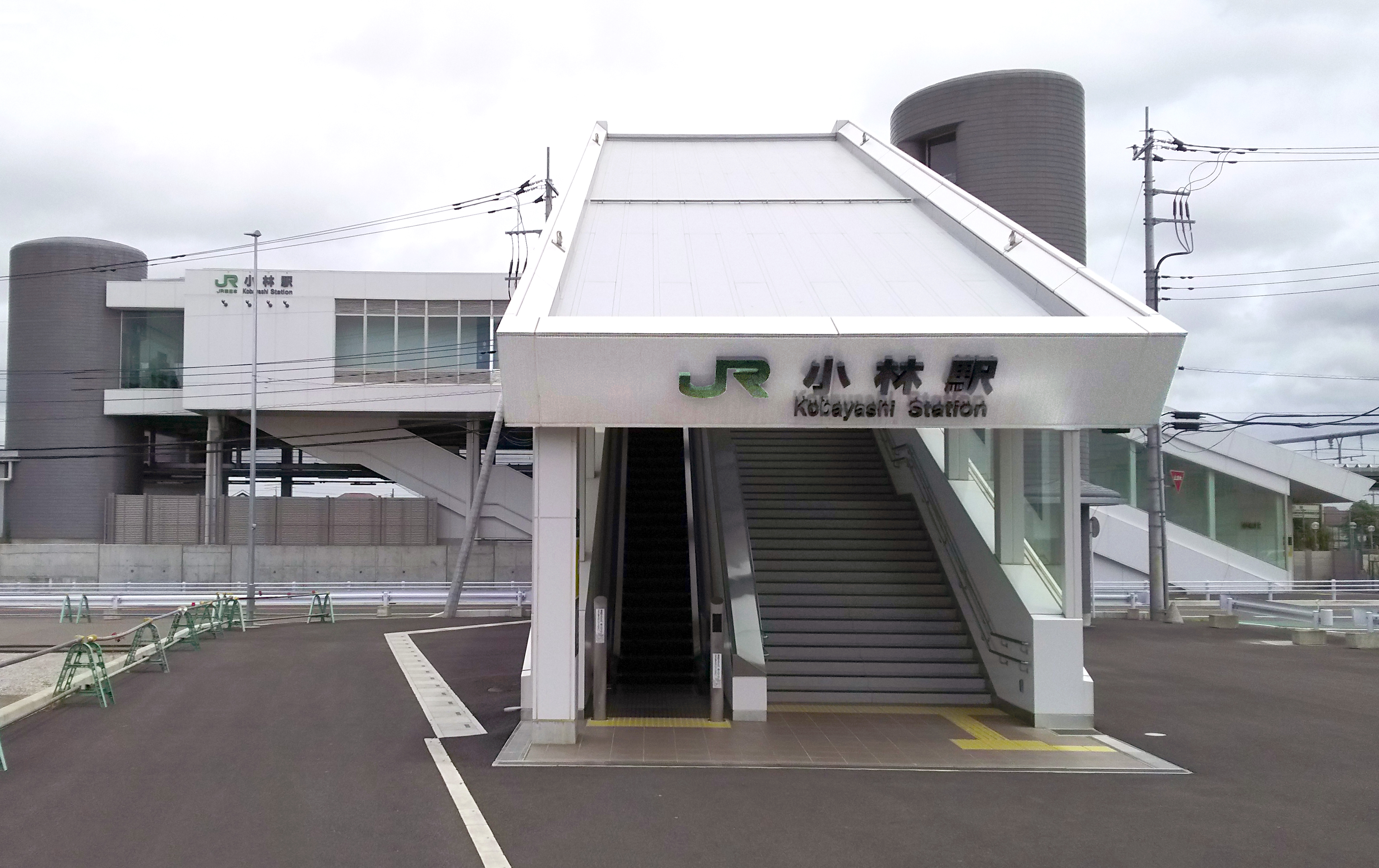 小林駅南口(cropped)